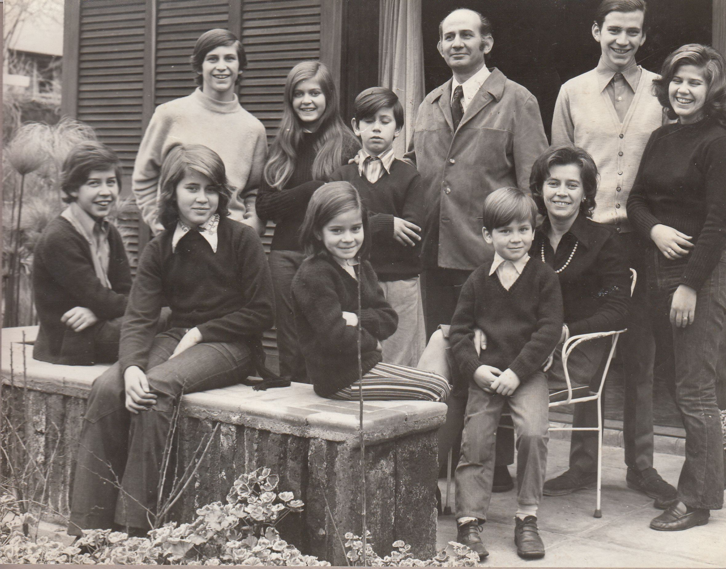 Eugenio Cruz Vargas junto a su esposa, Luz Vergara Errázuriz, y sus nueve hijos en la terraza de su hogar, en la comuna de Providencia, Chile. Por entonces Cruz Vargas se abría campo en el fomento de la cinematografía nacional gestionando filmaciones en Chile. Autor de la fotografía: Hugo Infante Troncoso, profesional chileno de la fotografía, quien en calidad de autor y propietario titular de la misma otorgó el consentimiento para publicar y difundir en la red internet esta imagen bajo las condiciones que establece la Licencia de Uso Creative Commons, Atribución-Compartigual 3.0 Unported (CC BY-SA 3.0).